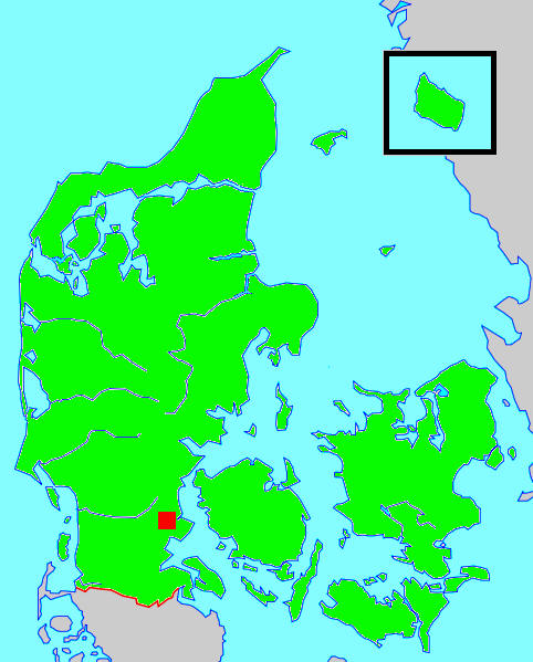 Mynd sem sýnir staðsetningu Haderslev í Danmörku.